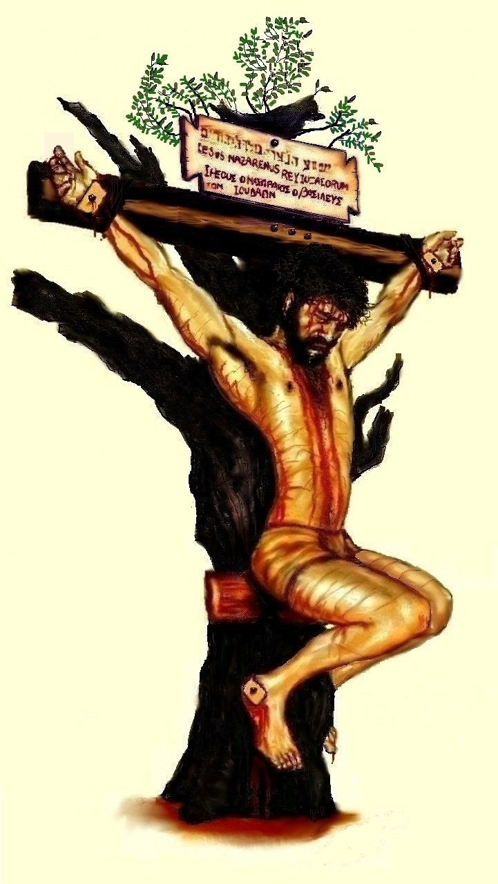 Joe Zias propone que Cristo podría haber muerto en un árbol.